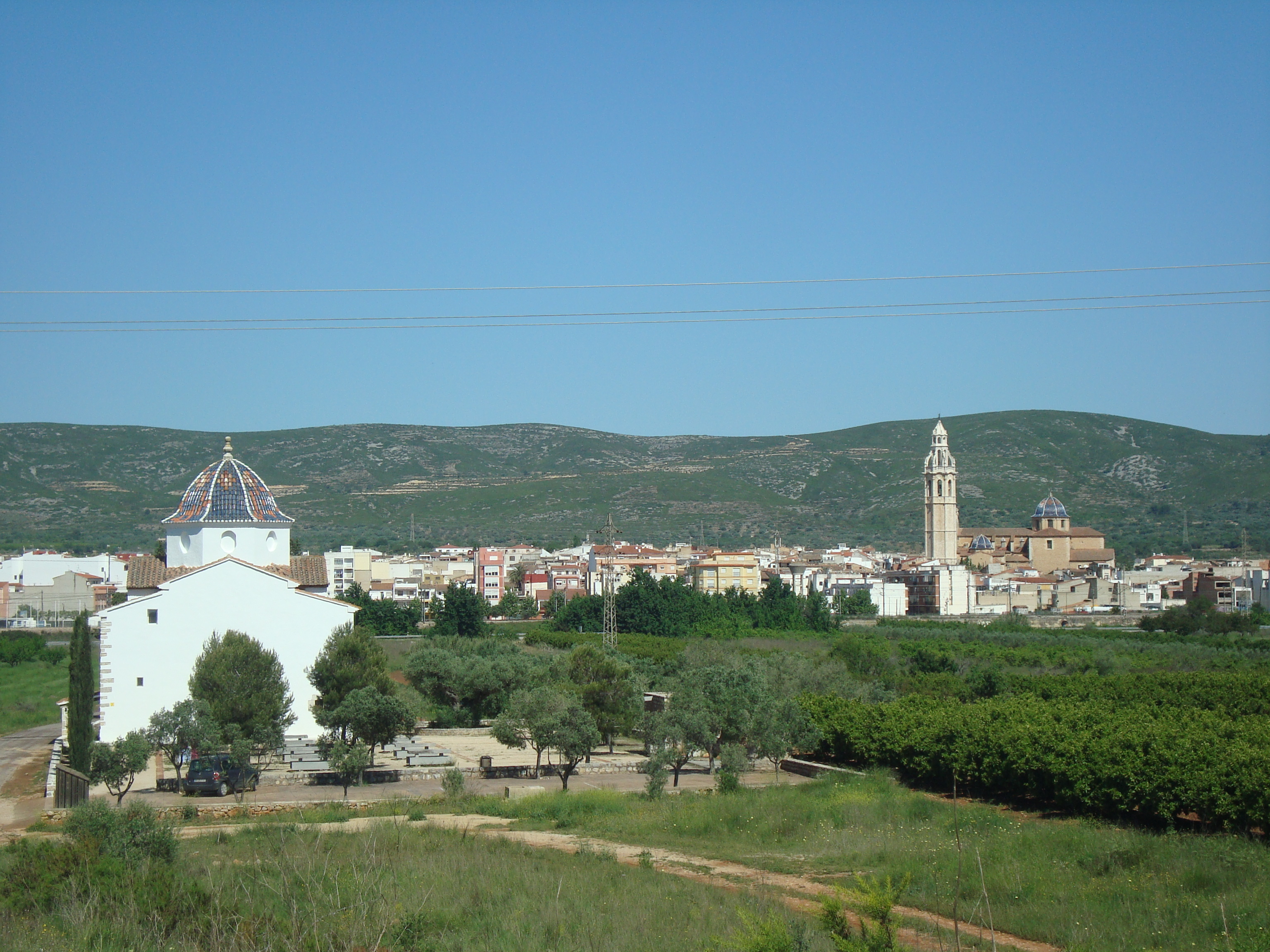 Vistas de Alcalà de Xivert